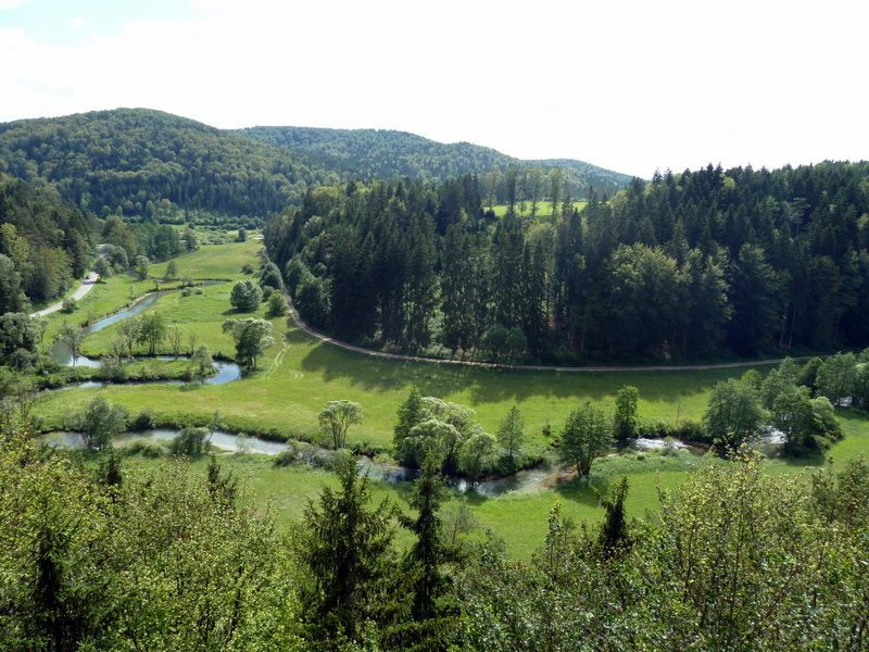 Lauterachtal